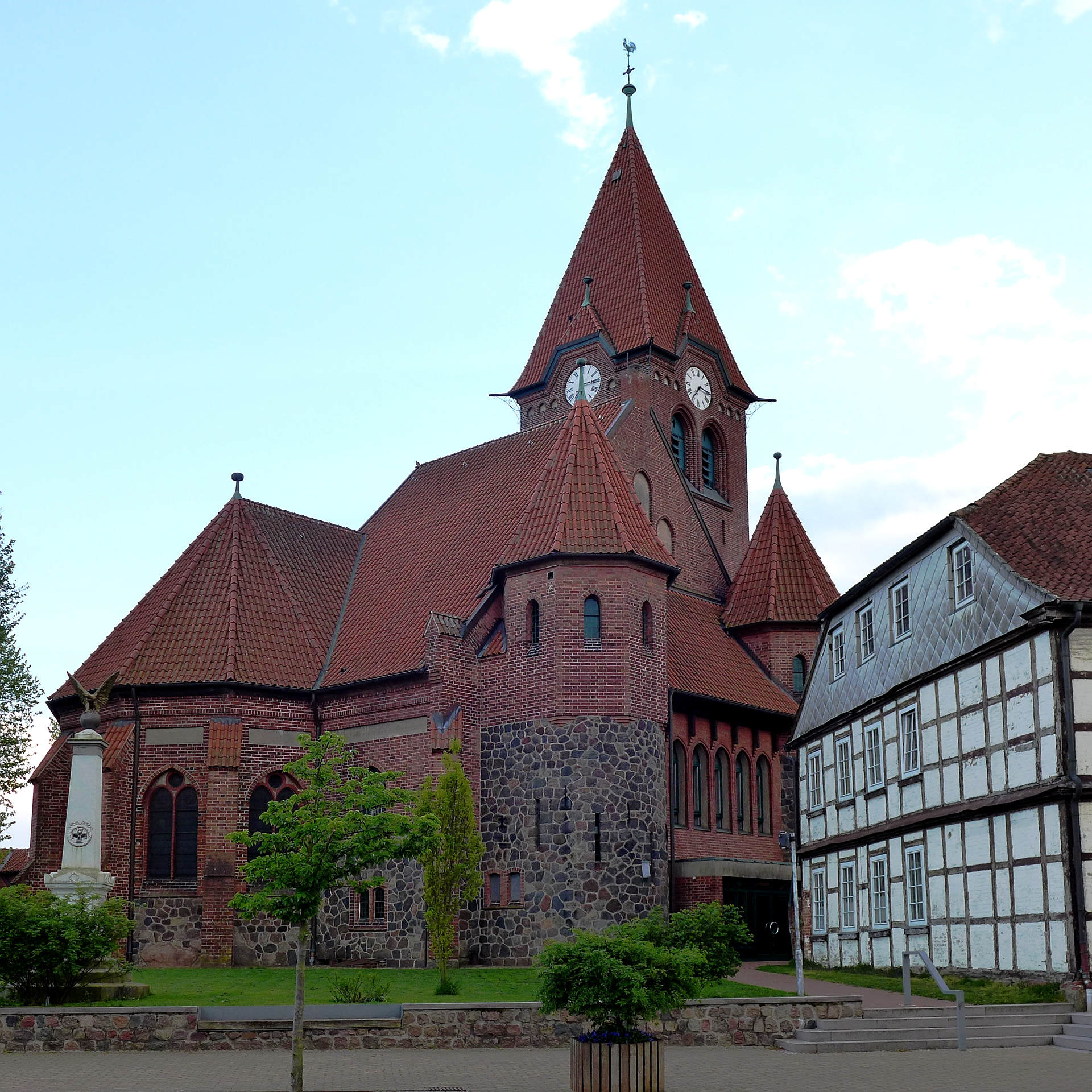 Evang.-Luth. St. Johannes Kirche in Dahlenburg, Blick vom Marktplatz in 2015-05. Kirche erbaut in 1903 bis 1905 auf den Grundmauern und unter teilweiser Beibehaltung von Feldstein-Außenmauern der Vorgängerkirche. Architekt Wilhelm Matthies (1867-1937) aus Bardowick.